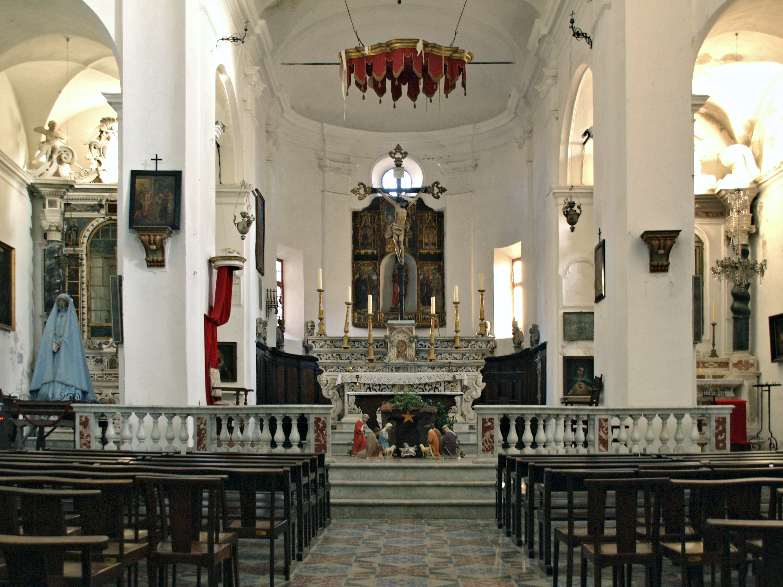 Calvi, Balagne (Corse) - le chœur (maître-autel, gradins, tabernacle en marbre polychrome du 17e s.) de l'église Saint-Jean Baptiste